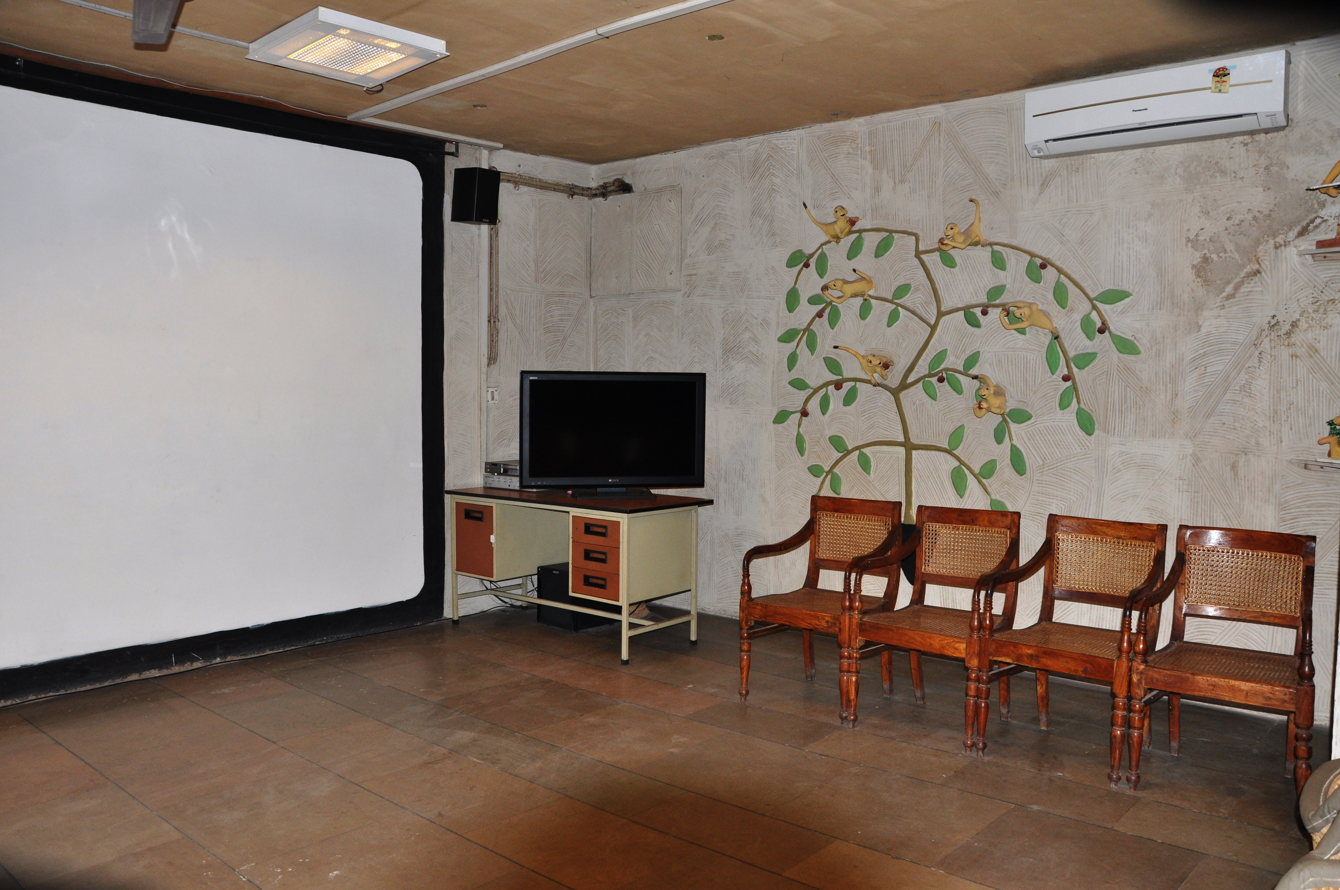 Audio Visual Room